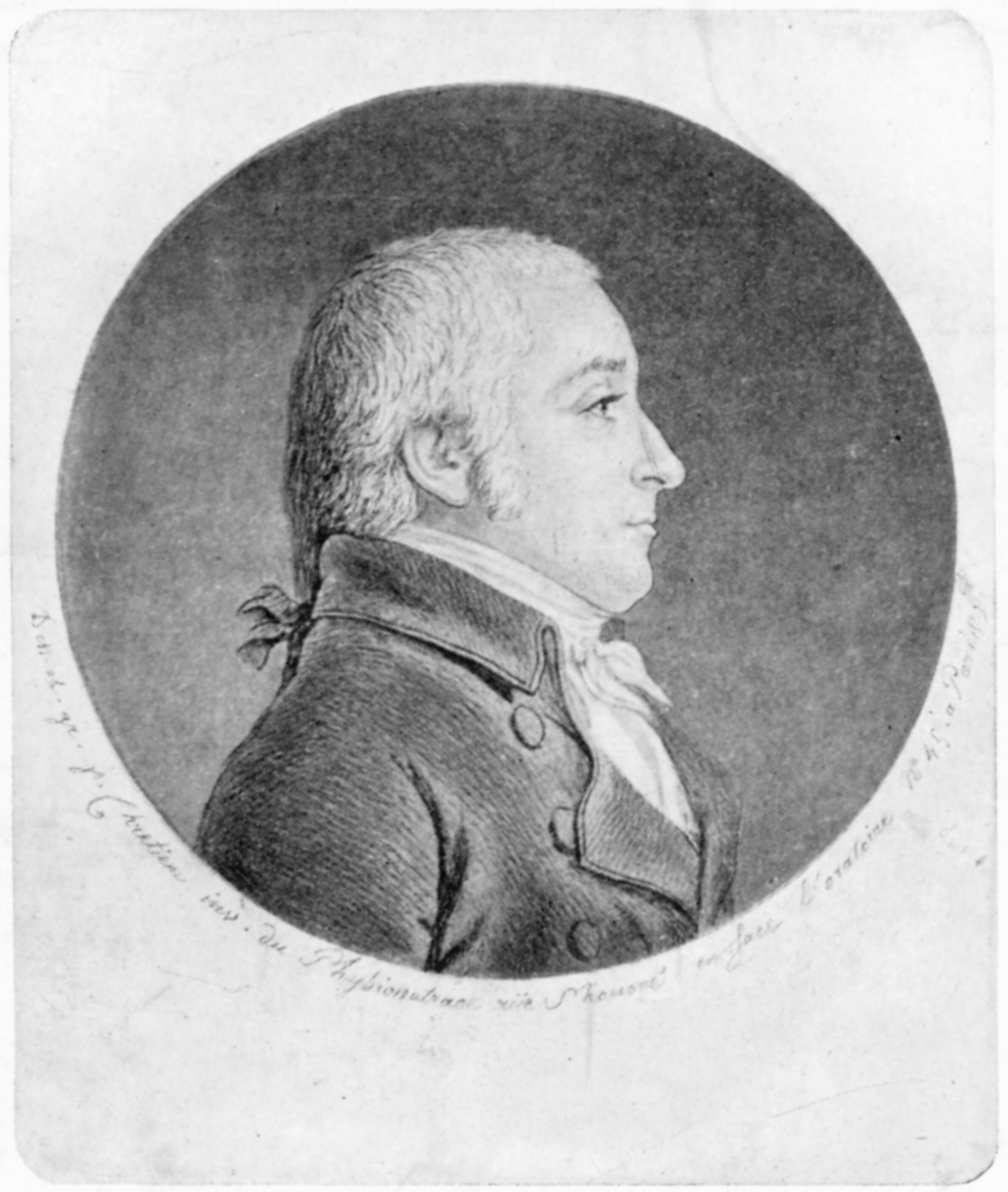 portret (detail) van de president van het Hoog Gerechtshof der Verenigde Nederlanden (1755-1820)